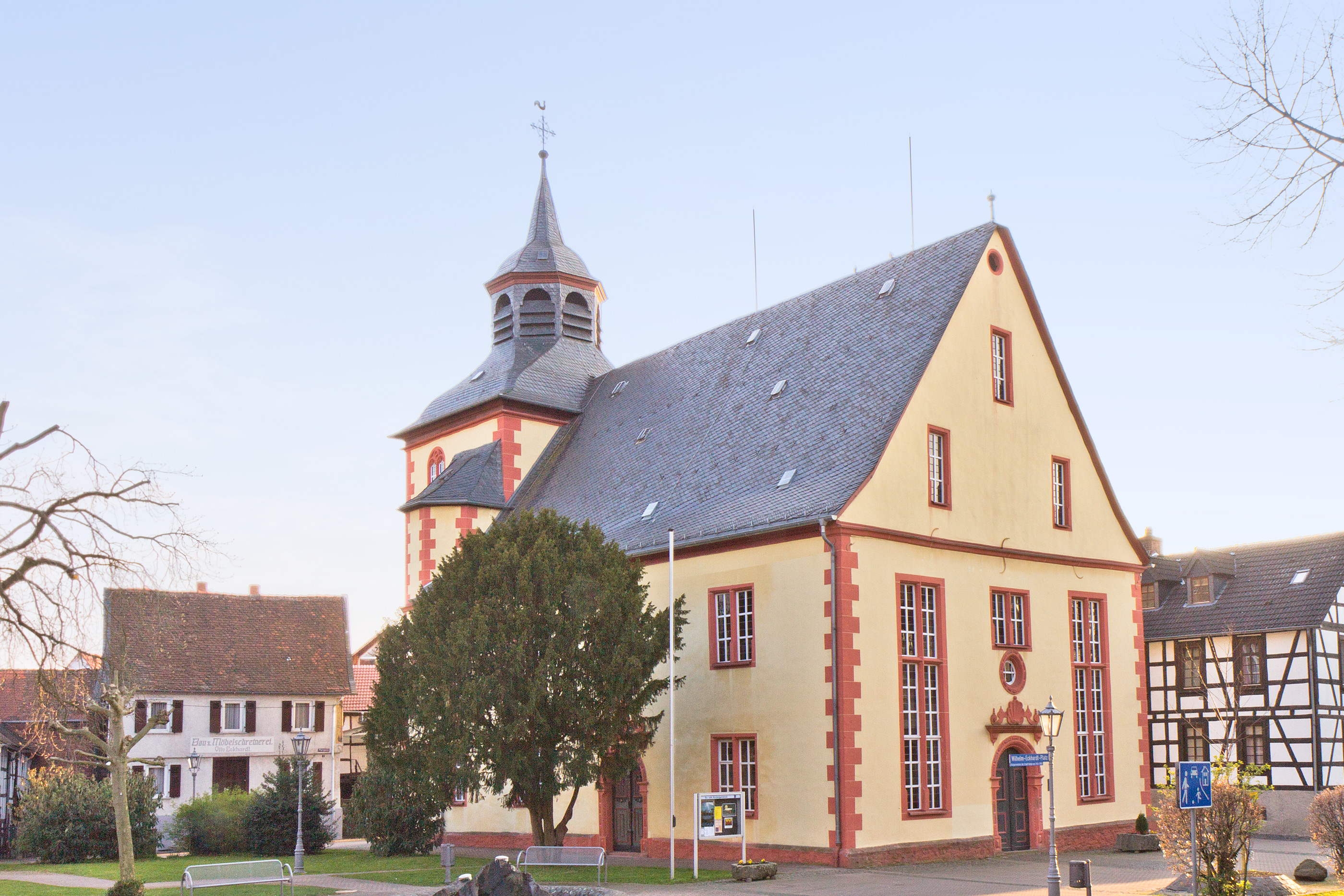 Evangelische Stadtkirche in Nidda (Wetteraukreis). Die evangelische Stadtkirche „Zum Heiligen Geist“ wurde 1615-1618 auf einem von Landgraf Ludwig geschenkten Grundstück erbaut durch den „fürstlichen Baumeister und Mainzer Werkmeister“, vermutlich Jakob Wustmann. Sie ist die älteste Saalkirche in Oberhessen.)